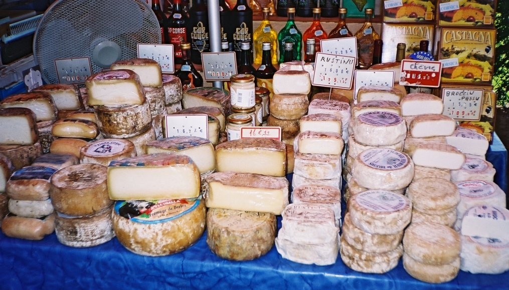 Fromages corses dans un marché corse